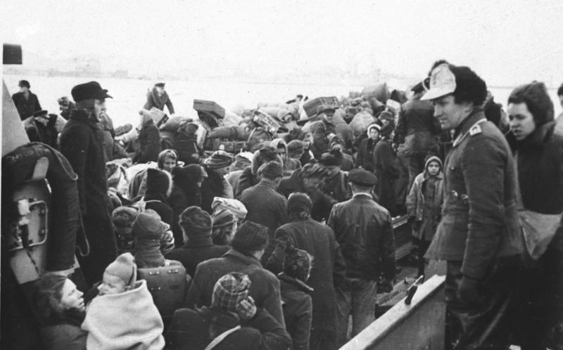 Einschiffung von Flüchtlingen auf F.S.S. Wedel in Pillau 1945